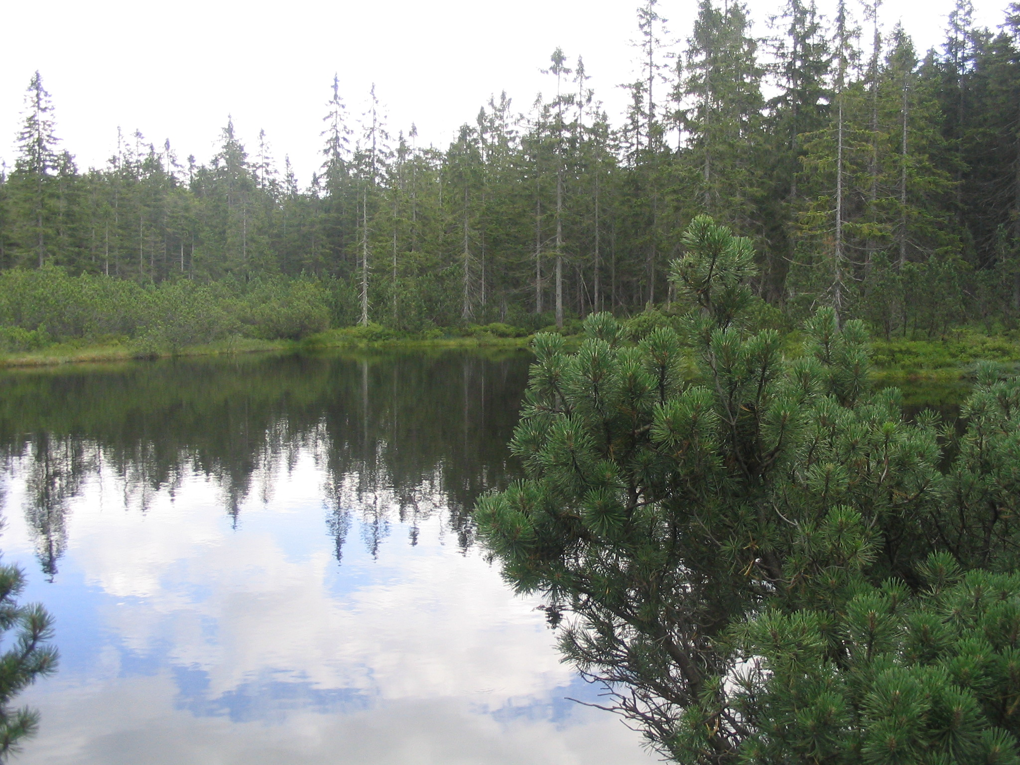 Latschensee im Nationalpark Bayerischer Wald, aufgenommen von Dr. Hagen Graebner am 31.07.2007